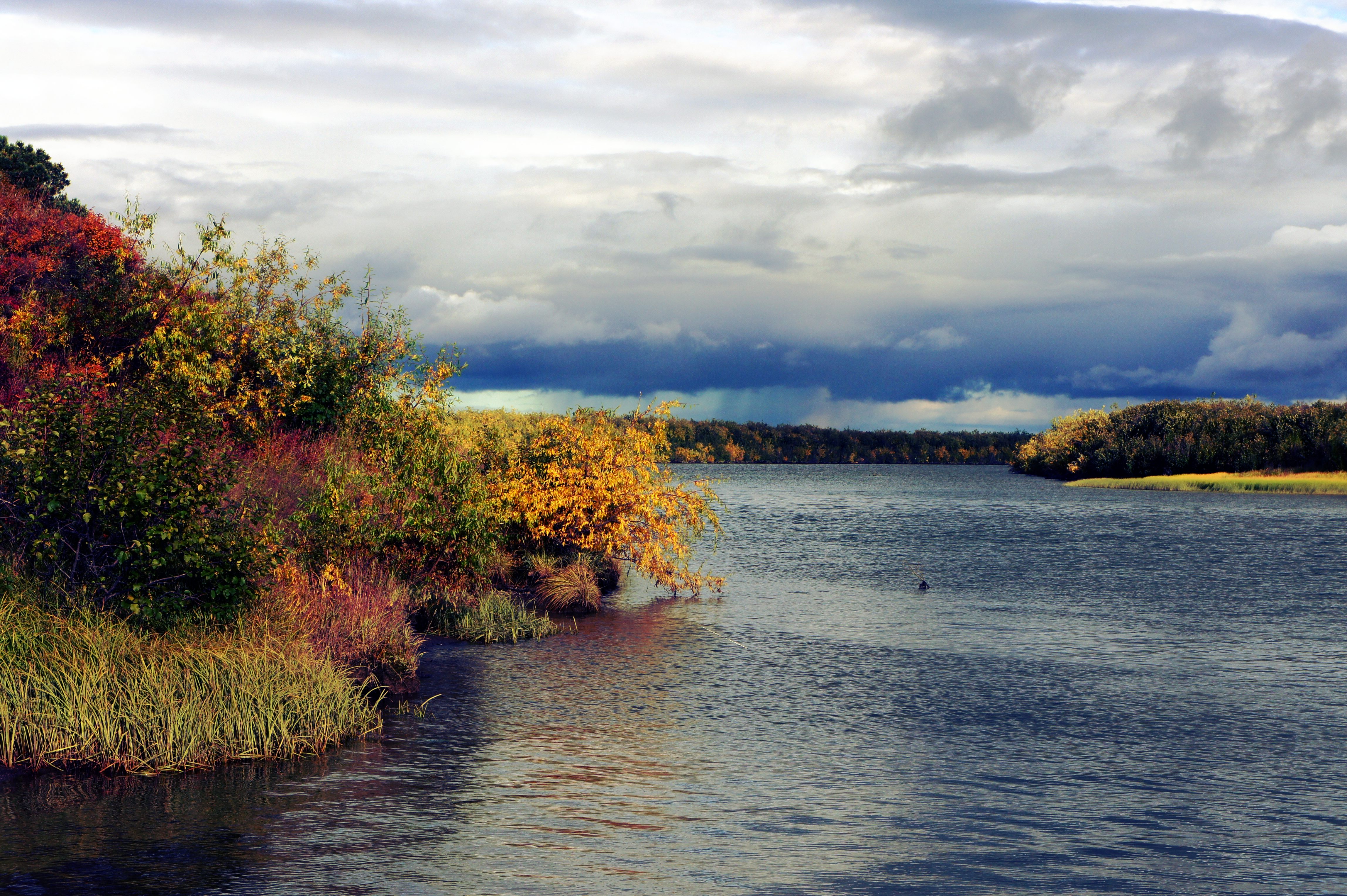 Устье Малого Каргопильгына